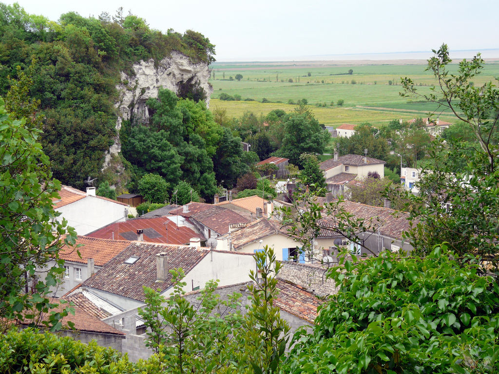 Le village de Mortagne est en Charentes-Maritime